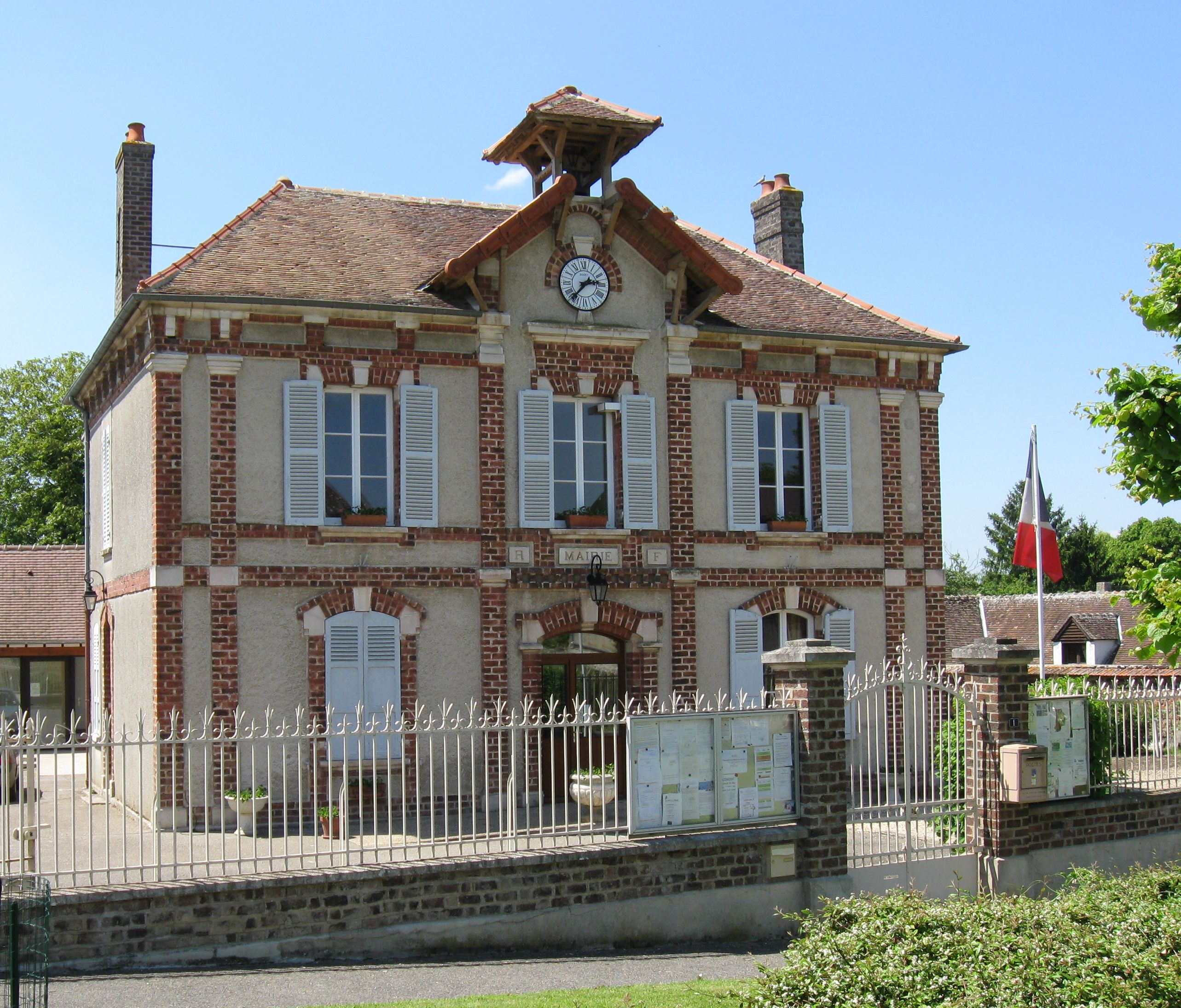 Mairie de Montigny-le-Guesdier. (département de la Seine-et-Marne, région Île-de-France).